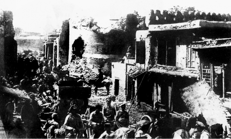 Вступление частей Красной армии в Старую Бухару.